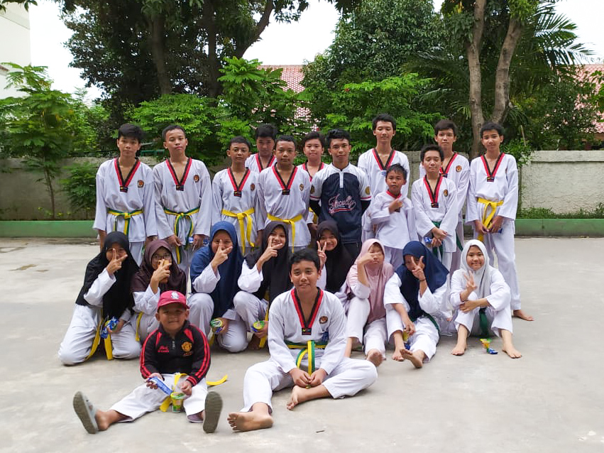 Taekwondo 205